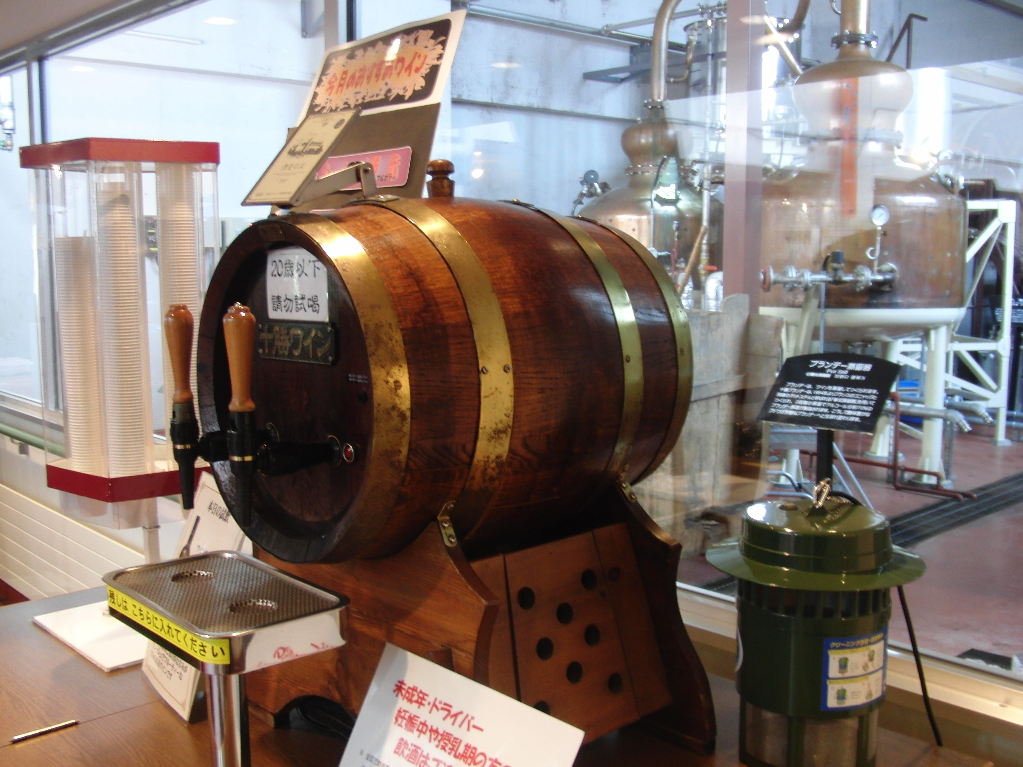 [1] ここ「池田ワイン城」の正式名は「池田町ブドウ・ブドウ酒研究所」 20歳以下請勿試喝